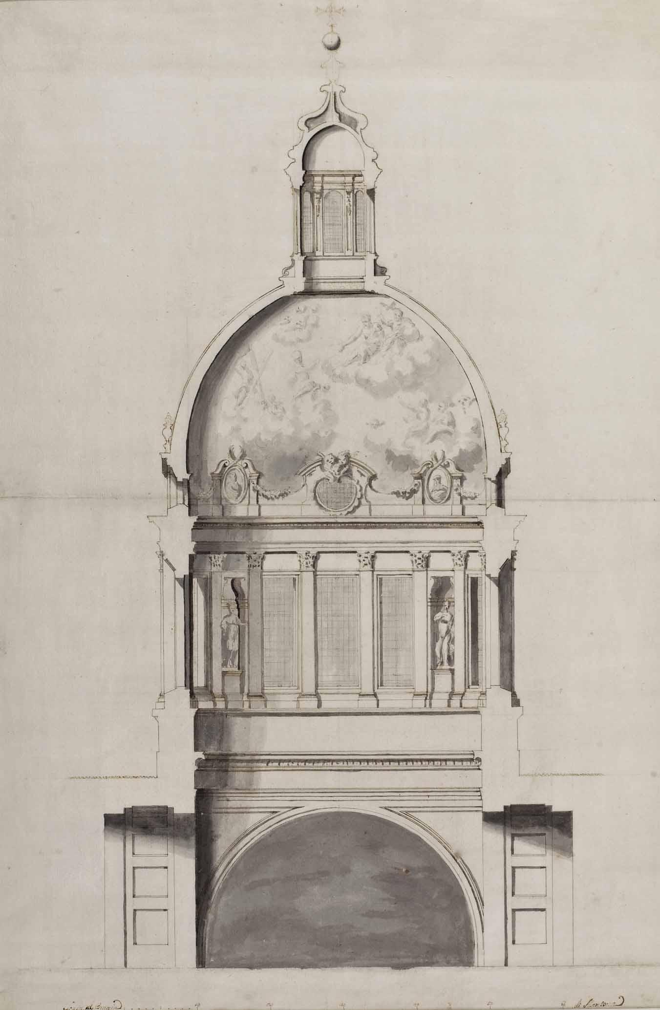 Schnitt durch die Kuppel von Sant'Andrea in Mantua; unten mit Originalbeschriftung: "Scala di Braccia ... di Mantova", in der Kuppelinnenseite Fresko: Glorie des Hl. Andreas mit Andreas-Kreuz, Feder/Tusche, grau laviert, ca. 71 x 47 cm